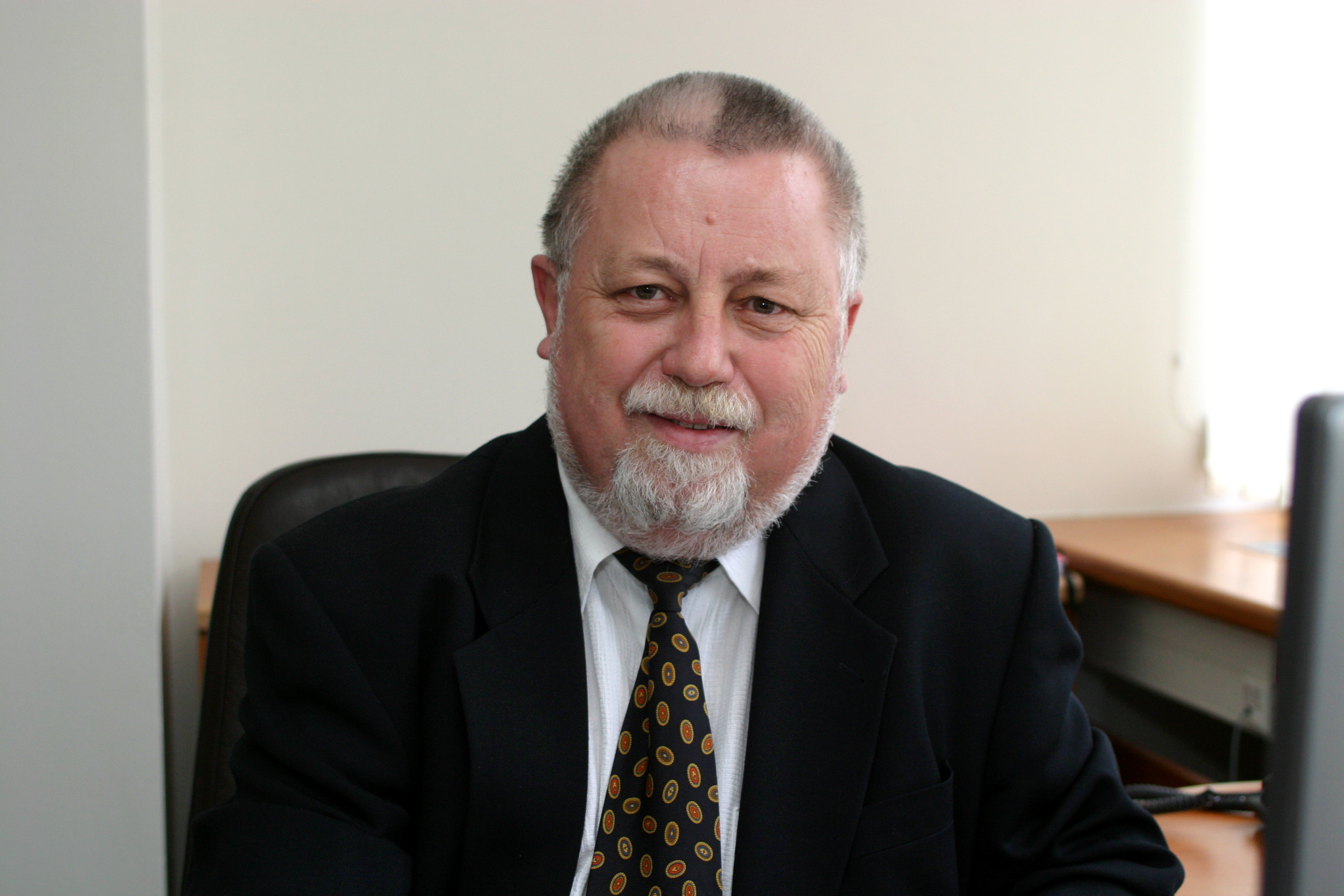 Ing. Zdeněk Juračka - COOP, SOCR ČR